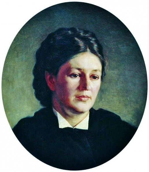 Ritratto di Marija Pavlovna Nevrotina, moglie del pittore itinerante ucraino Nikolaj Jarošenko